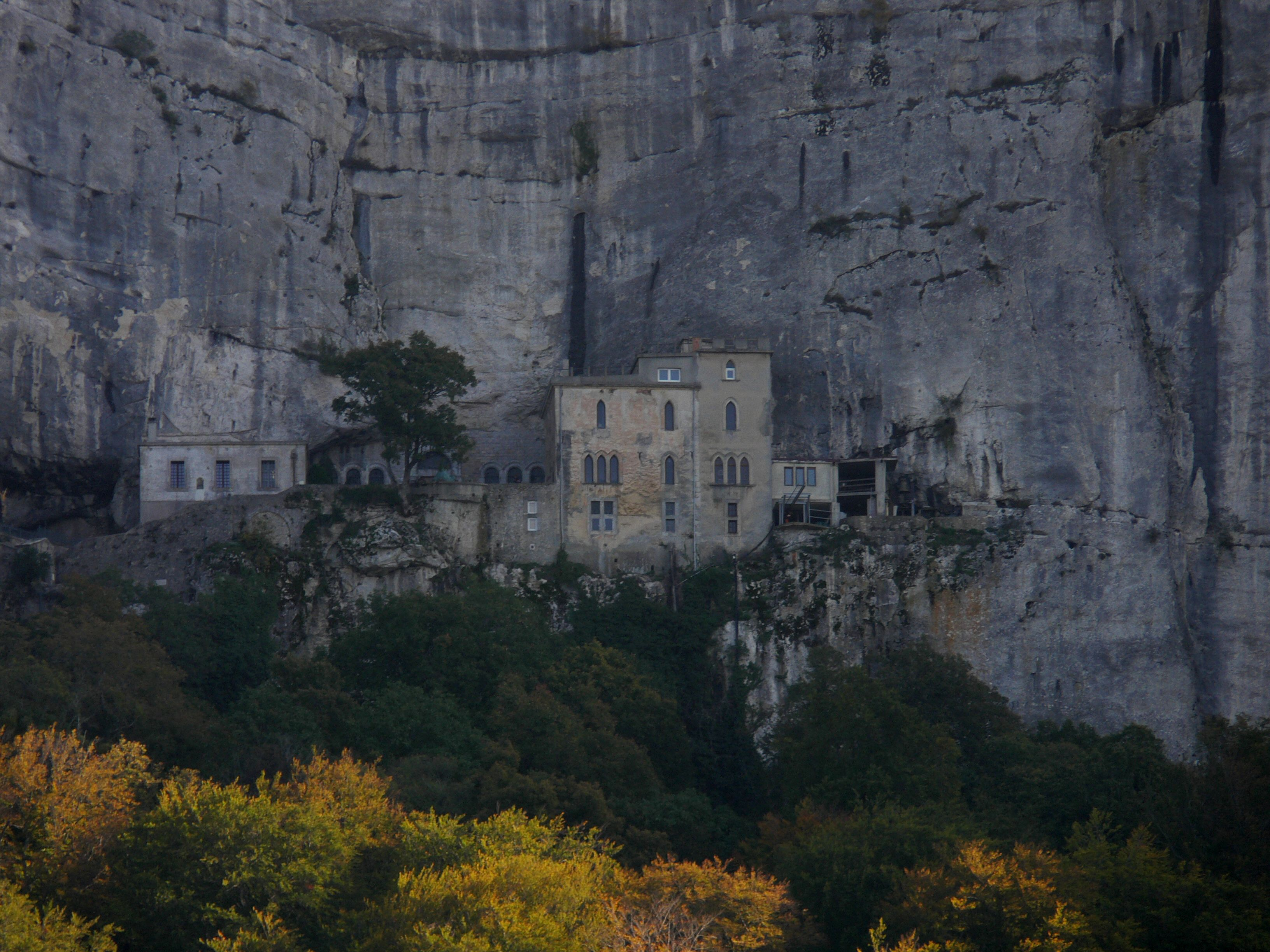 Massif de la Sainte-Baume (Var, France), versant Nord. Bâtiments à flanc de montagne.